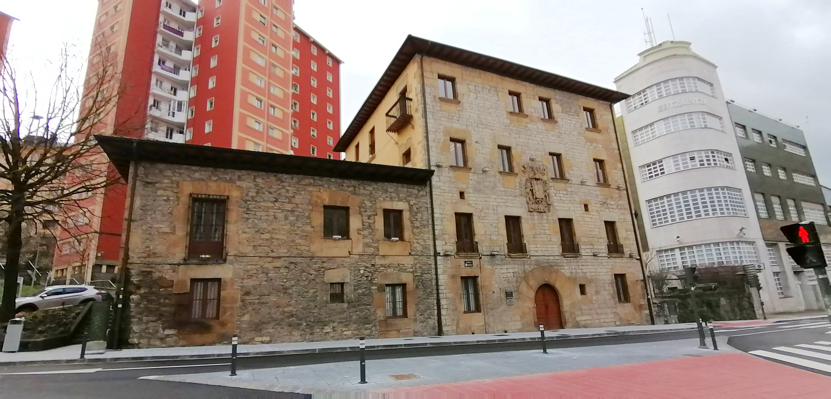 Markeskua jauregia